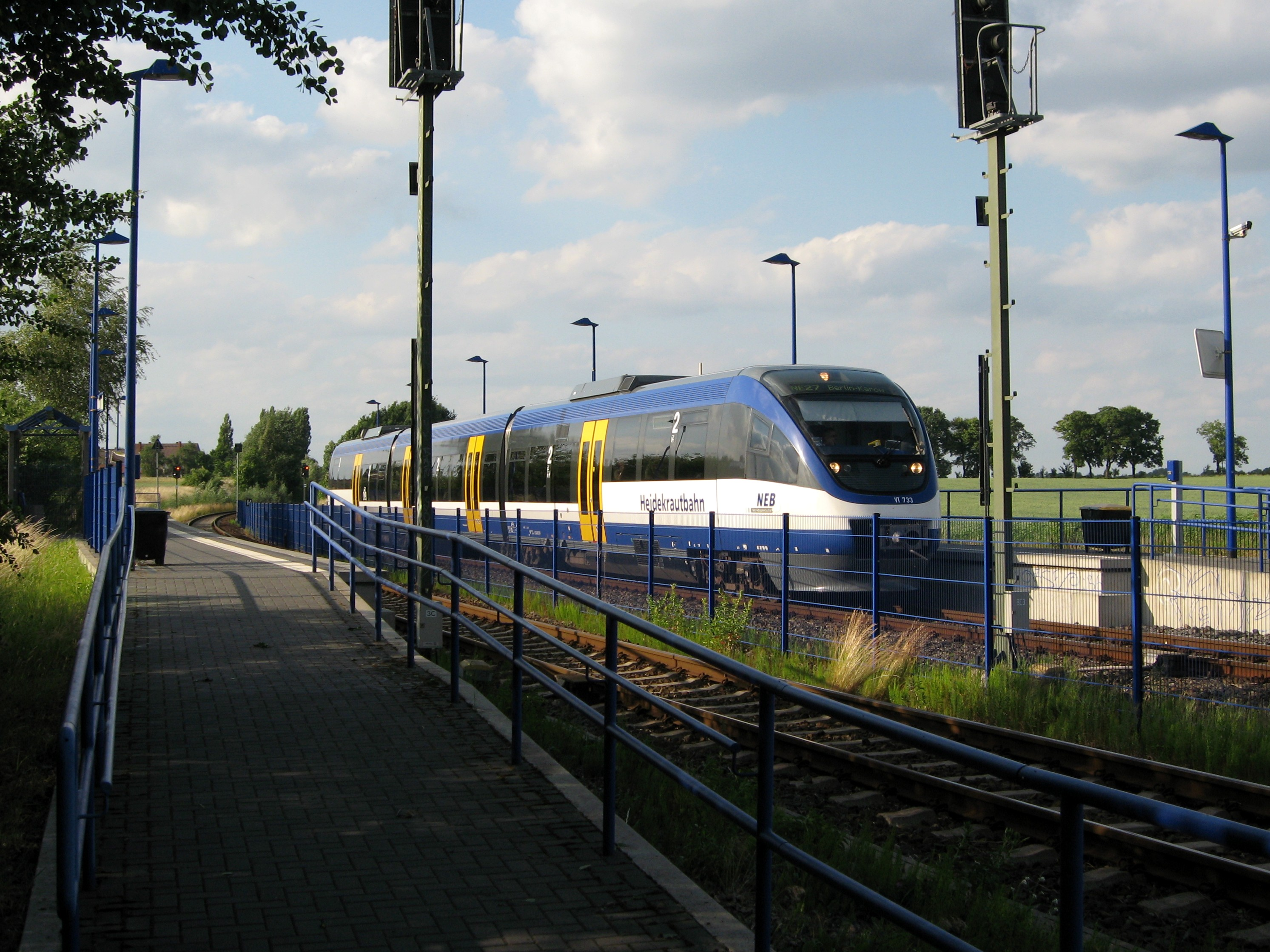 Haltepunkt der Niederbarnimer Eisenbahn in Schönerlinde, Gemeinde Wandlitz, Landkreis Barnim, Land Brandenburg, Deutschland